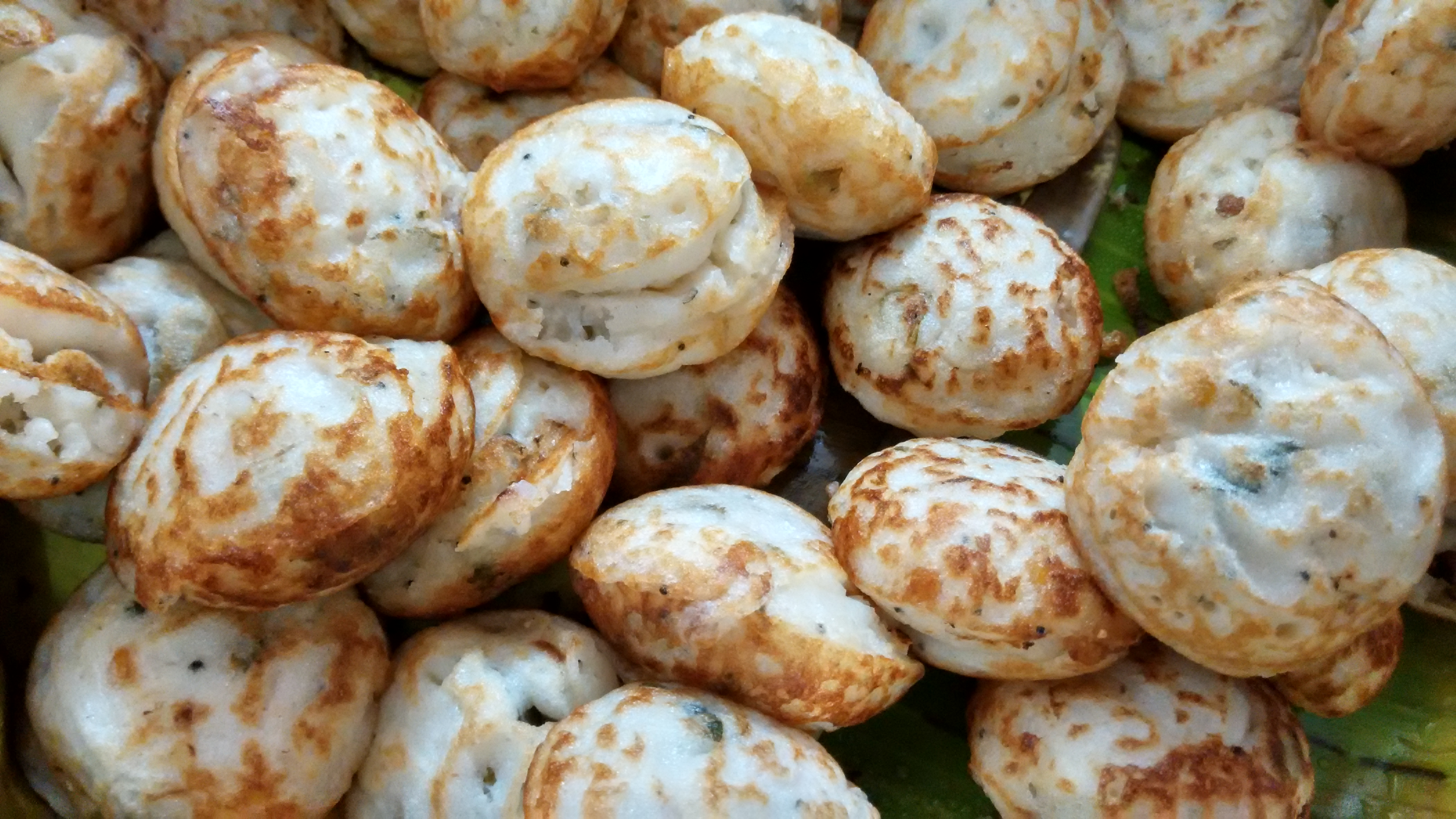 பனியாரம்